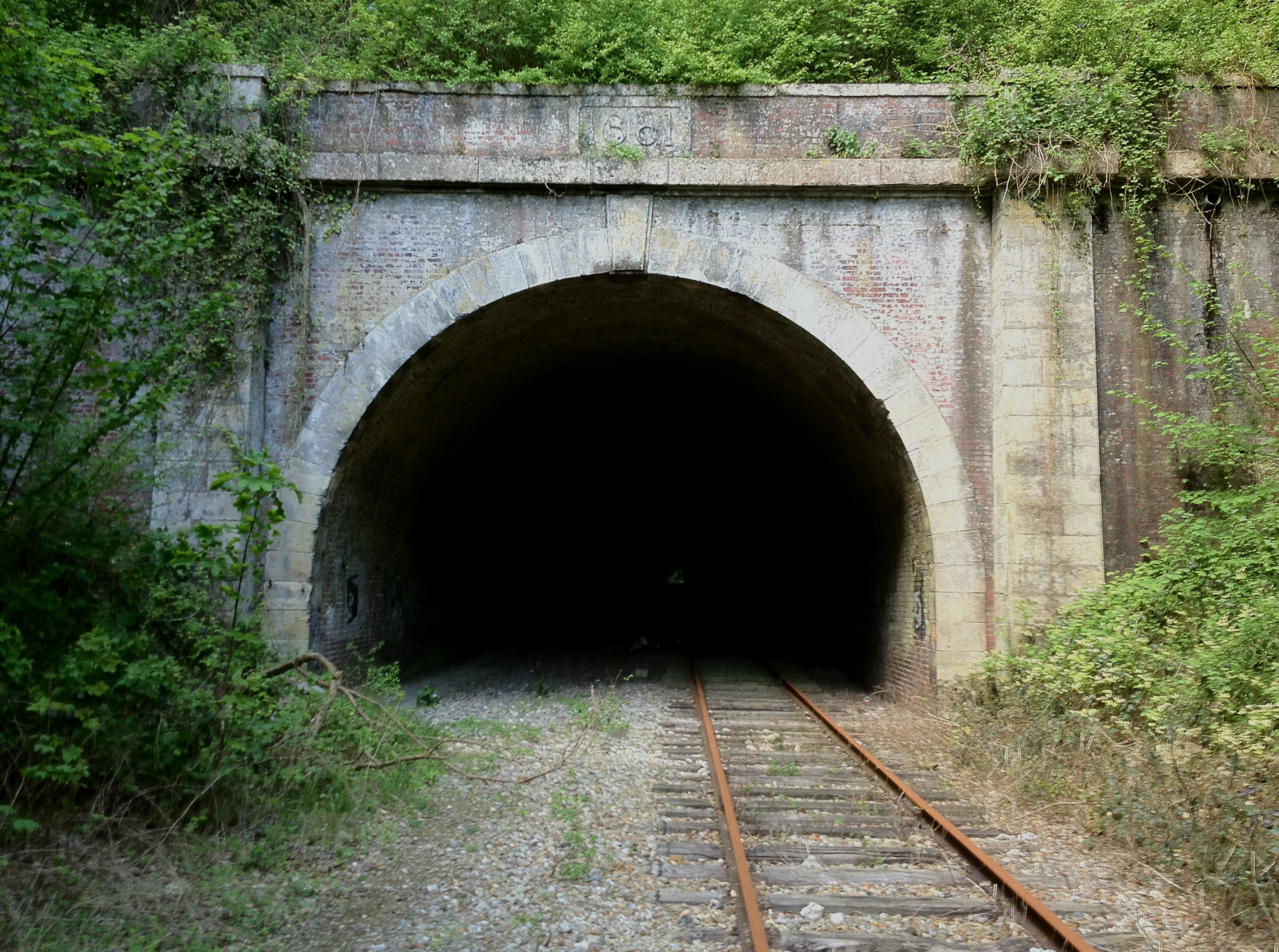 Entrée Ouest du tunnel de la maredote (Moulineaux, Seine Maritime, France)